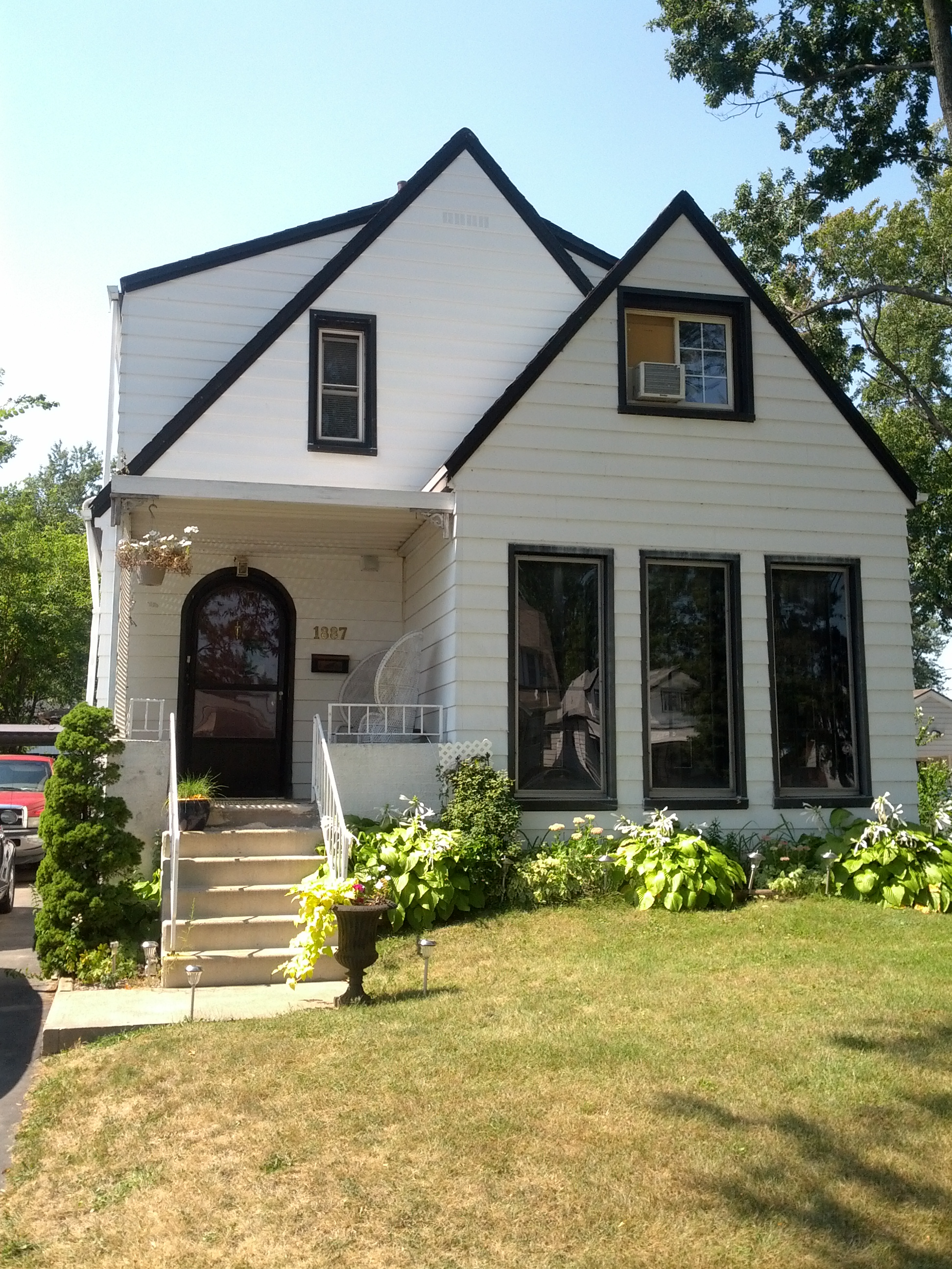 Upper duplex one bedroom rental. $650